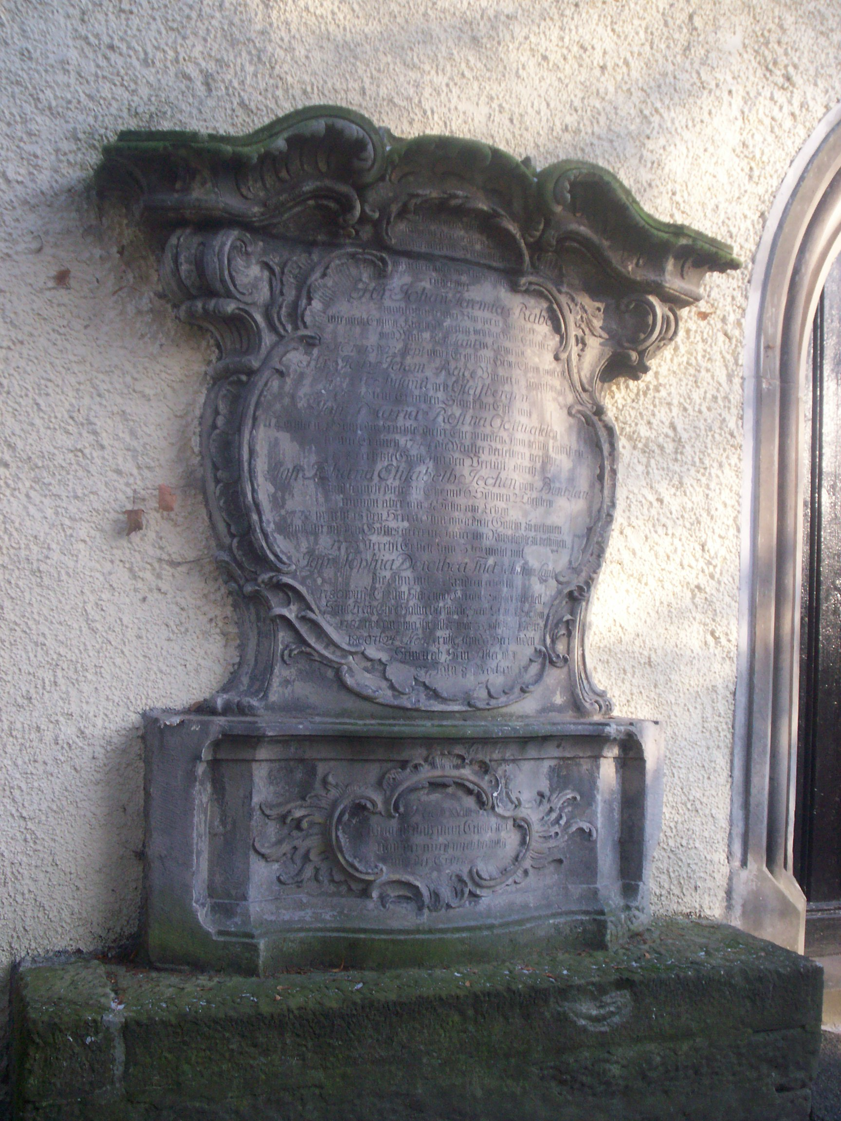 Lwówek Ślaski – epitafium na kaplicy cmentarnej.